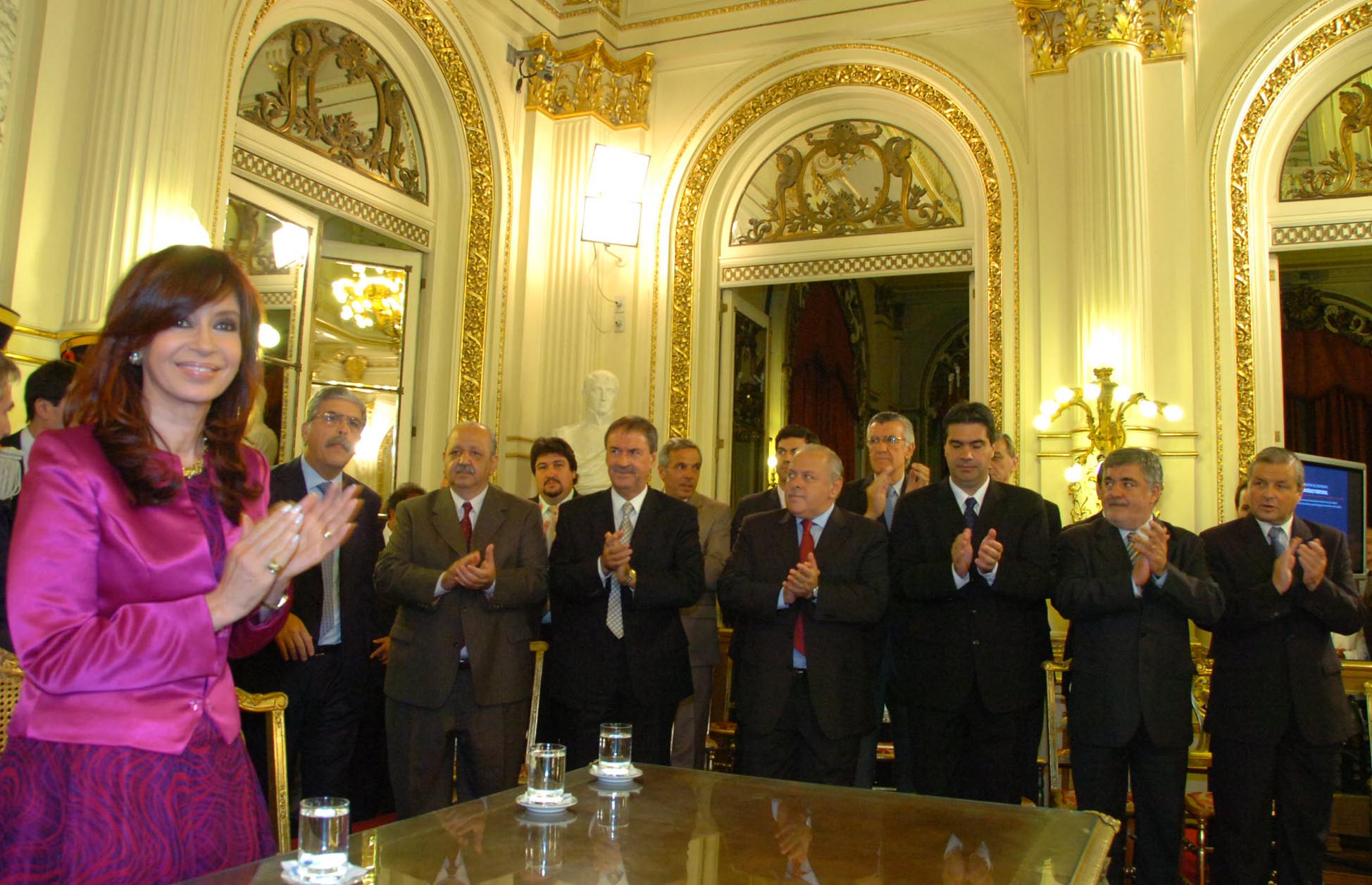 La presidenta Cristina Fernández encabezó el acto de lanzamiento del Plan Estratégico de Desarrollo Territorial, en el Salón Blanco.